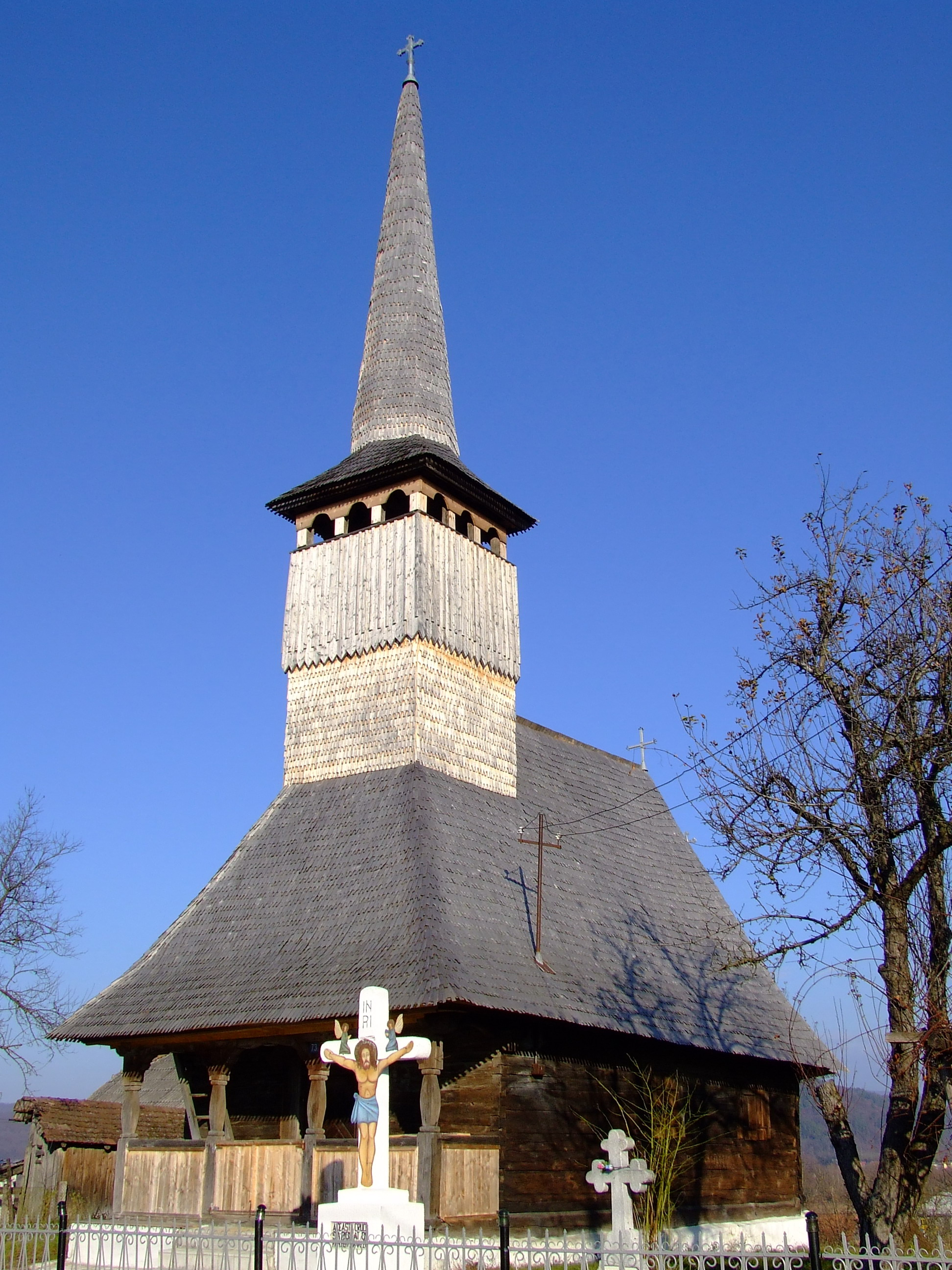 Biserica de lemn din Podişu, judeţul Sălaj. Autor: Bogdan Ilieş Data: noiembrie 2006